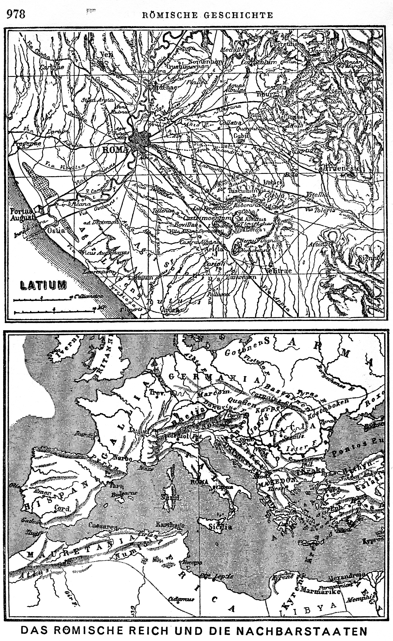 maps from Mommsen's "Römische Geschichte": "Latium" & "das Römische Reich und die Nachbarstaaten"